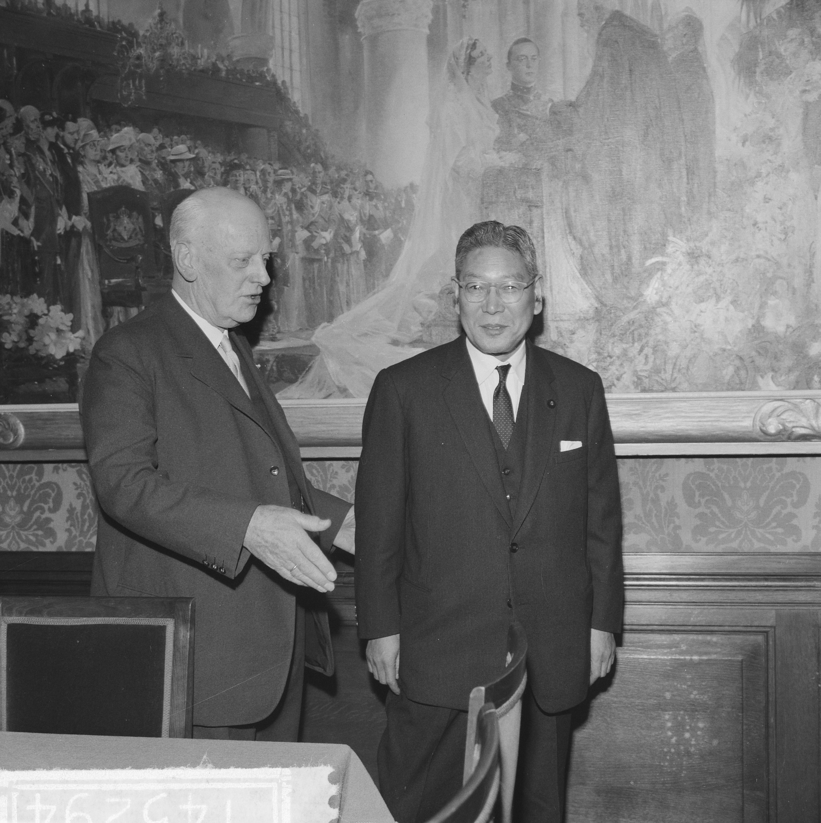 De voorzitter van de Eerste Kamer mr. J.A. Jonkman en premier Ikeda voor het schilderij van de huwelijksinzegening van prinses Juliana en prins Bernhard door Pieter van der Hem